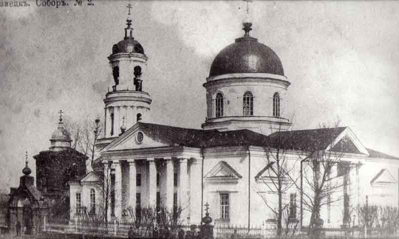 Собор Покрова Пресвятой Богородицы города Кузнецка